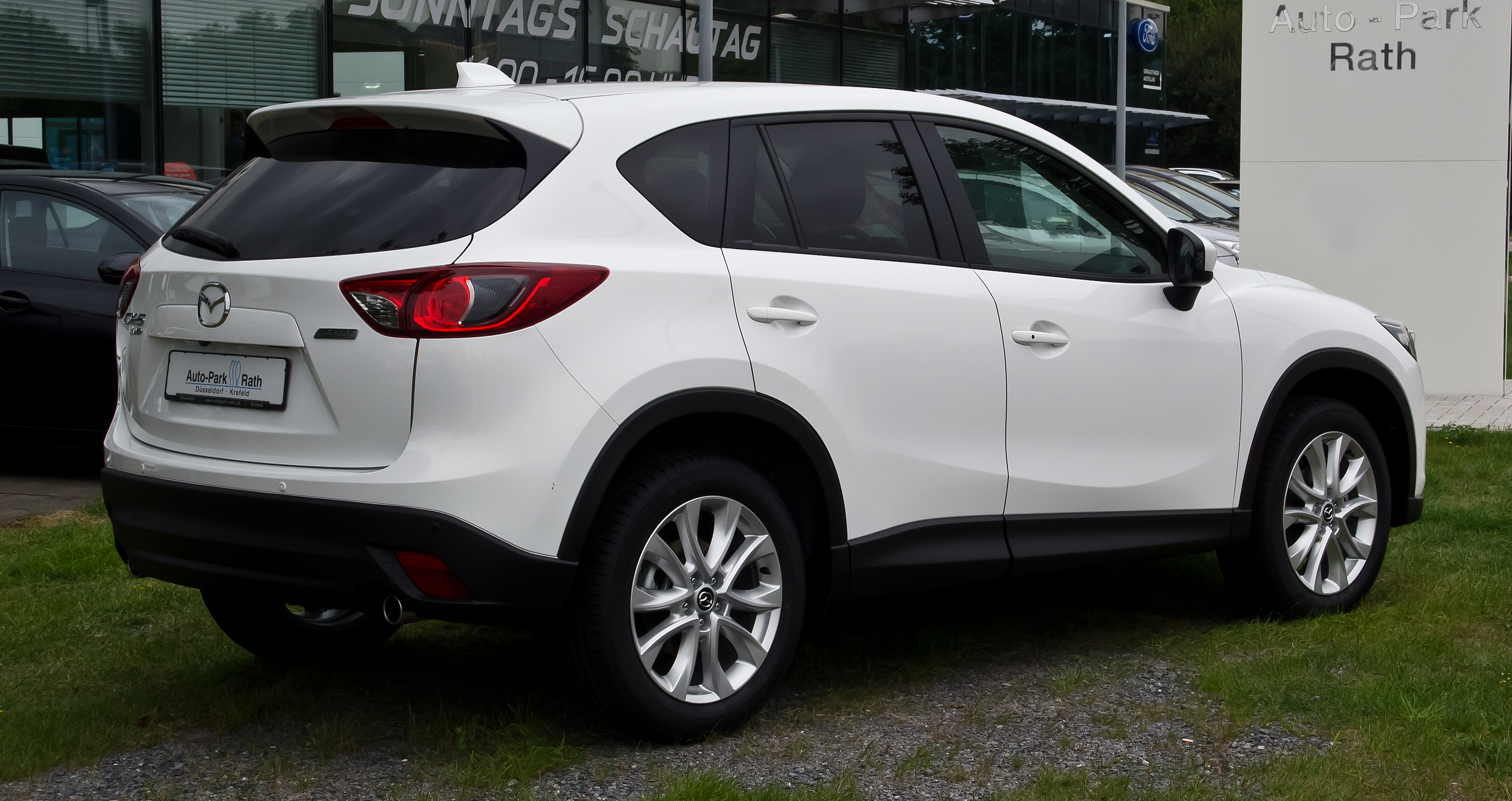 Mazda CX-5 2.0 SKYACTIV-G AWD Sports-Line